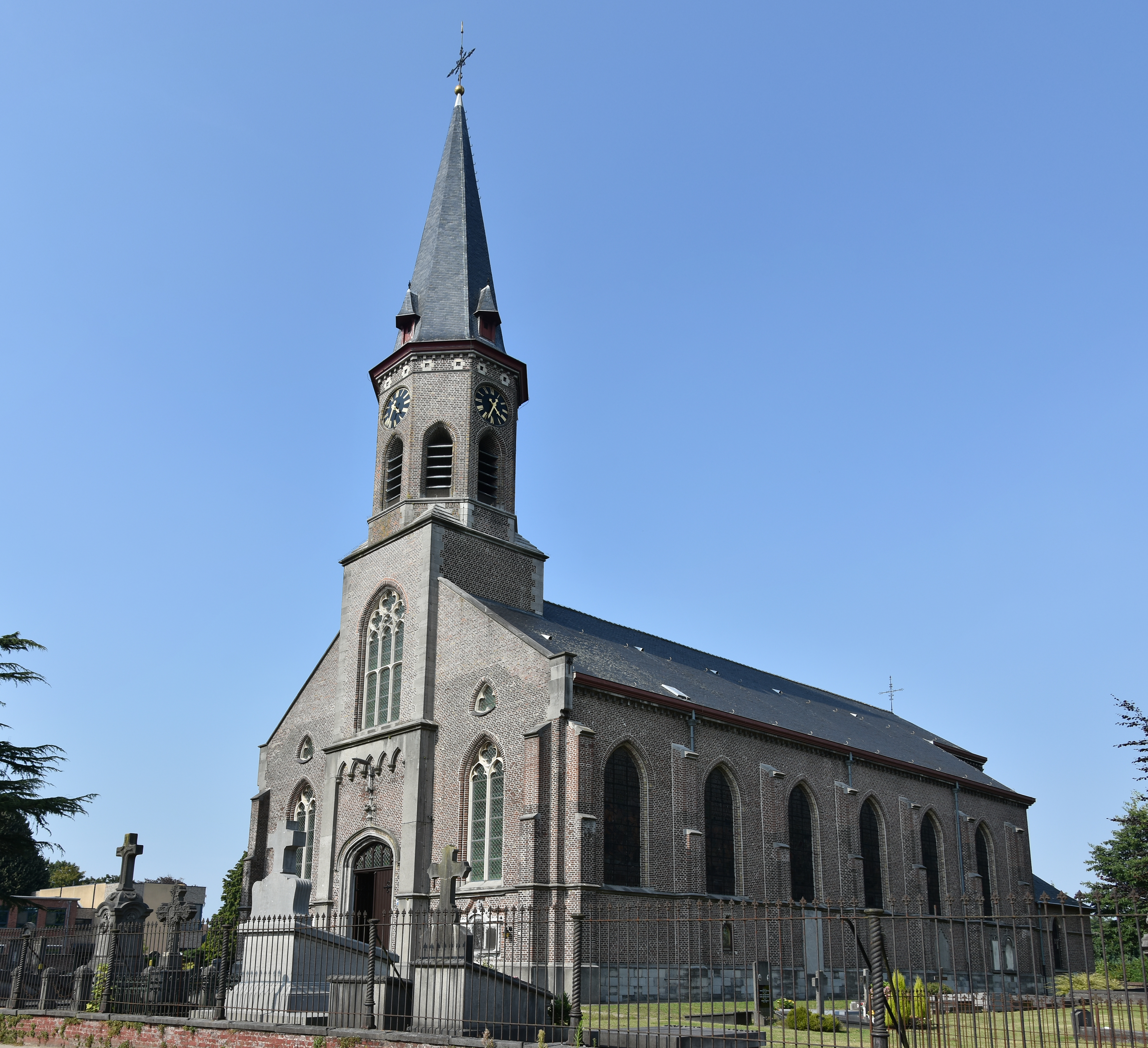 Sint-Denijs-Westrem - Sint-Denijskerk 18-8-2016 16-36-11